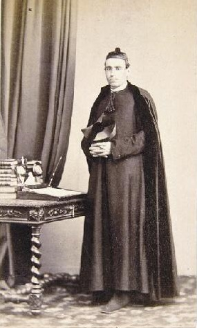 Jaime Agustí y Milá, fotografía de J. Laurent. Museo de Historia de Madrid